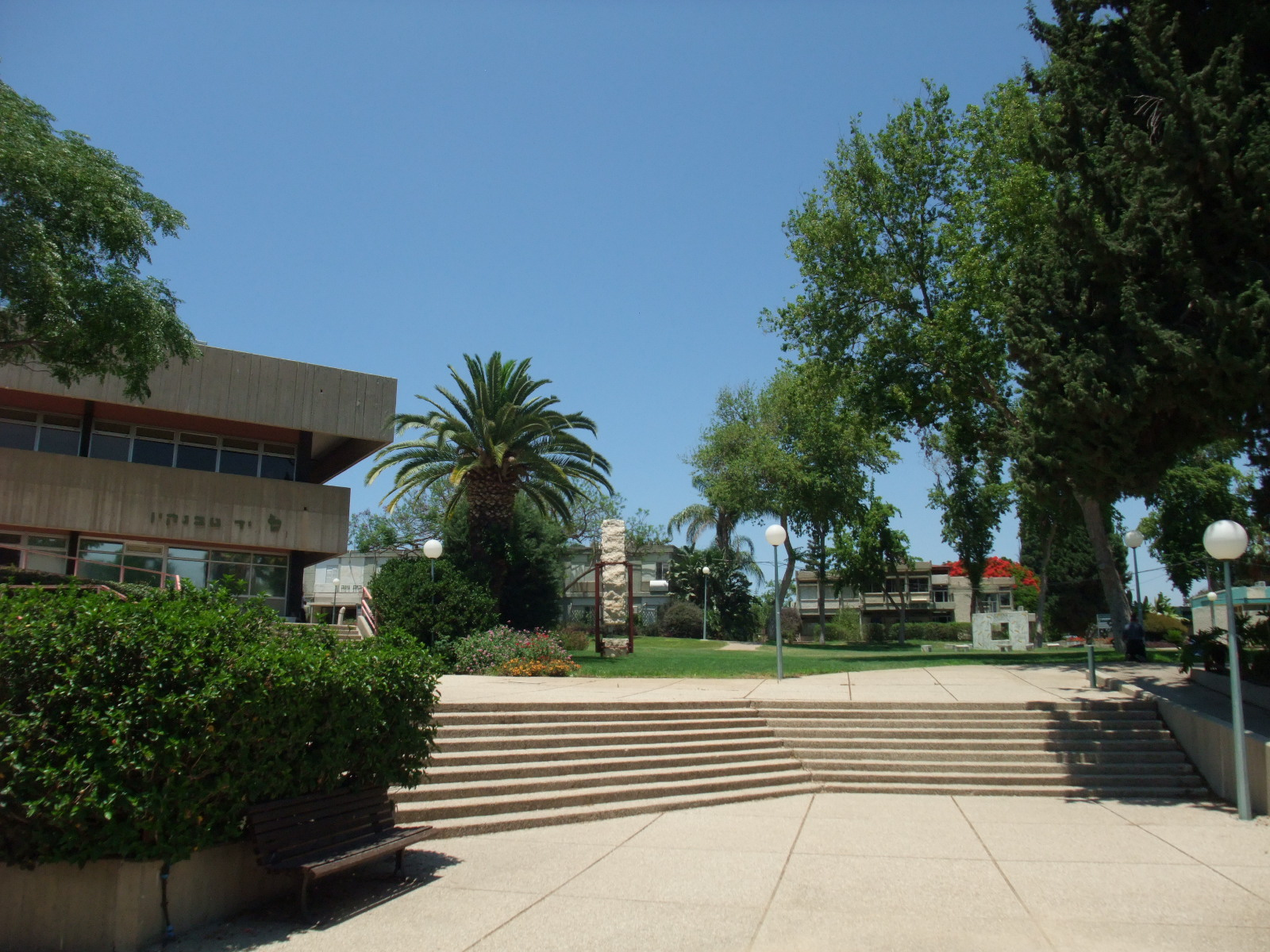 סמינר אפעל